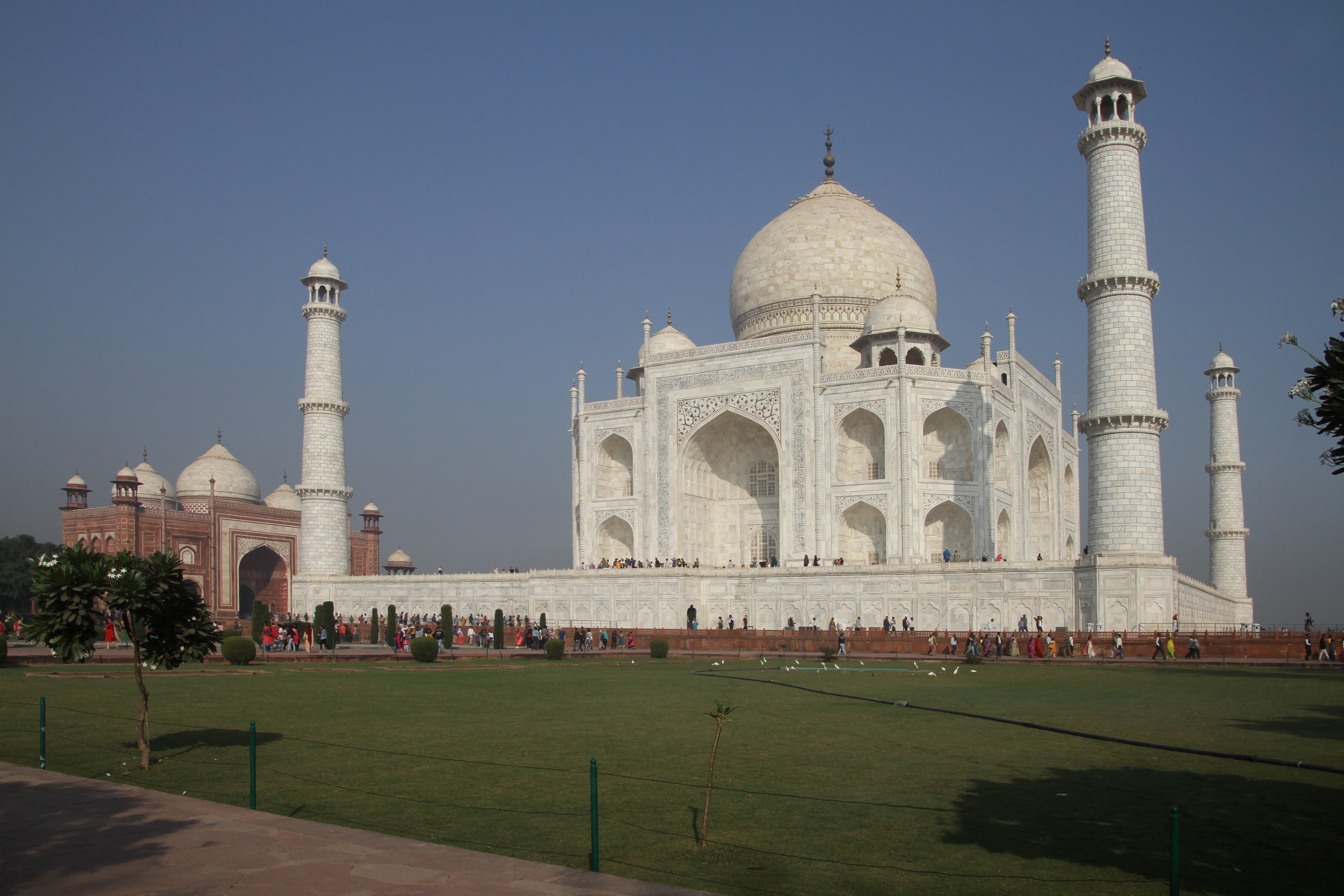 Taj Mahal in Agra